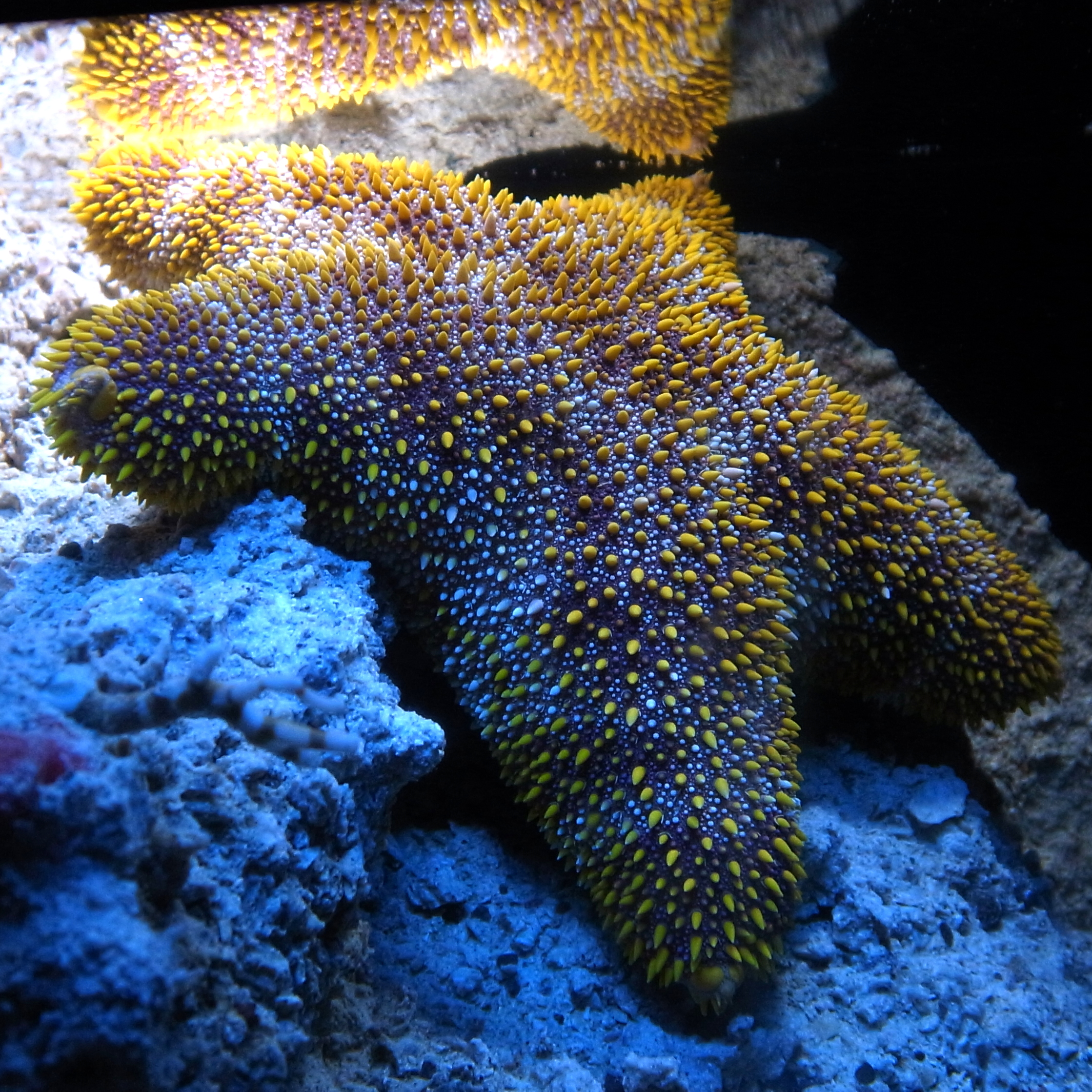 Asterodiscides japonicus, Okinawa Churaumi Aquarium, Japan